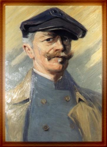 Professor Johann Adolf Rettelbusch (1858-1934), Selbstbildnis